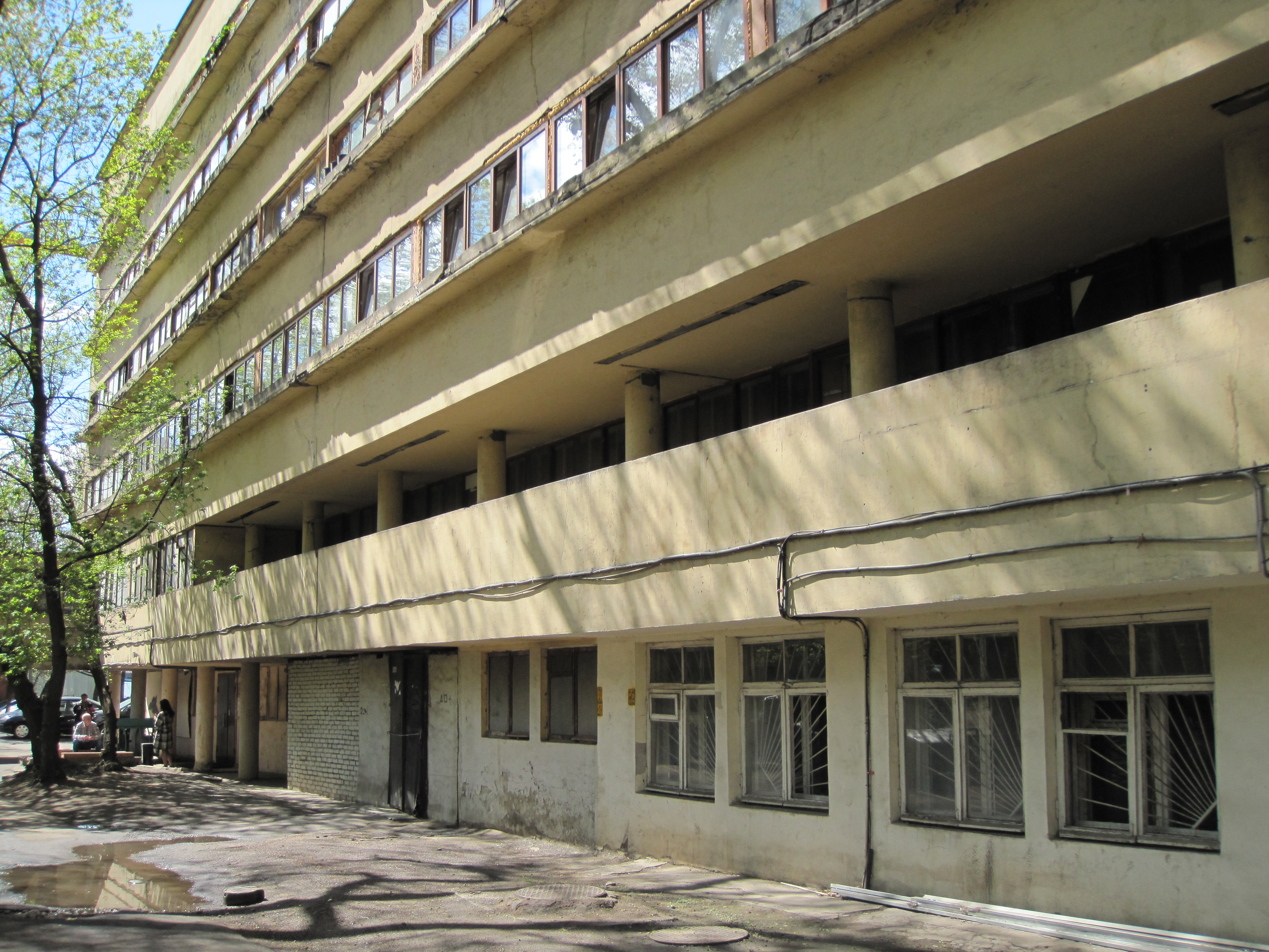 Het Narkomfin in 2015